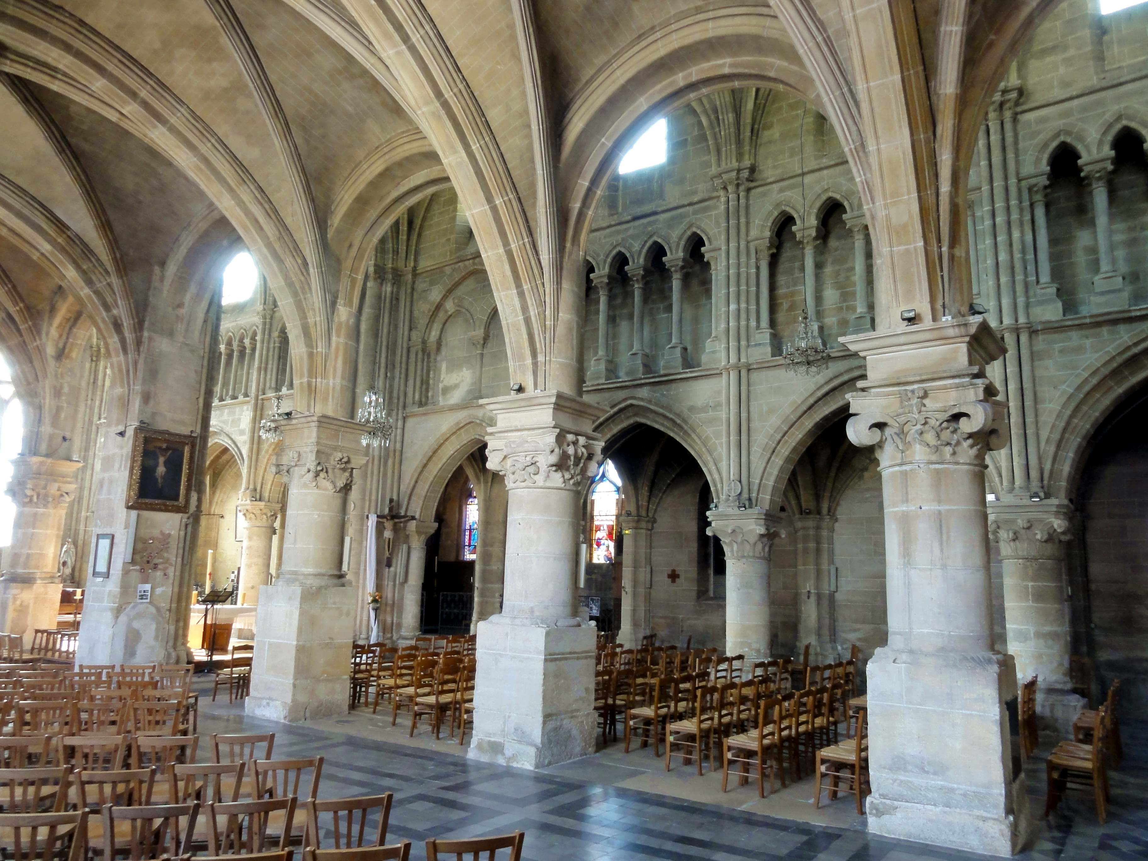 Intérieur de l'église - voir titre.